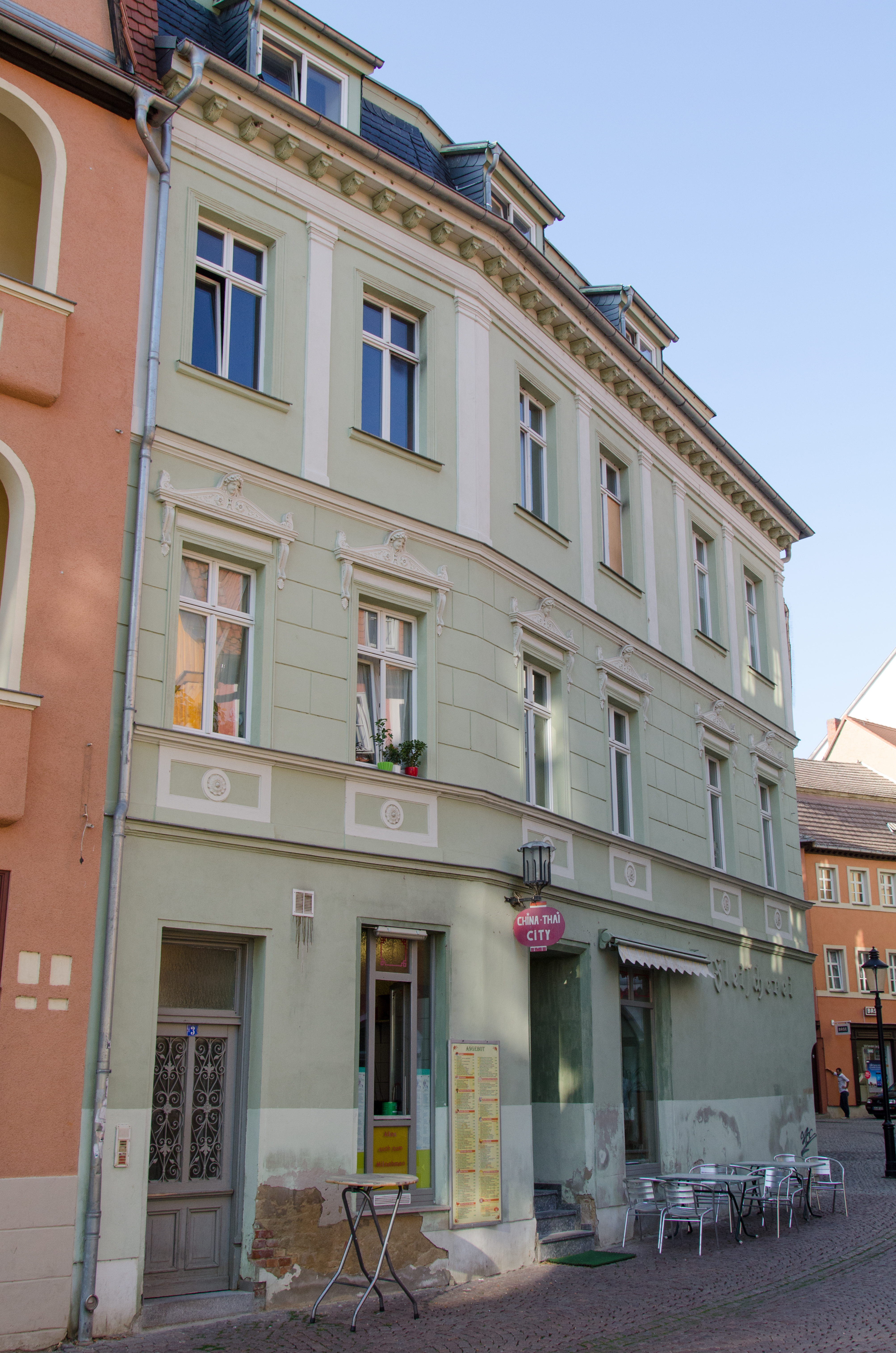 Naumburg, Salzstraße 3, 2